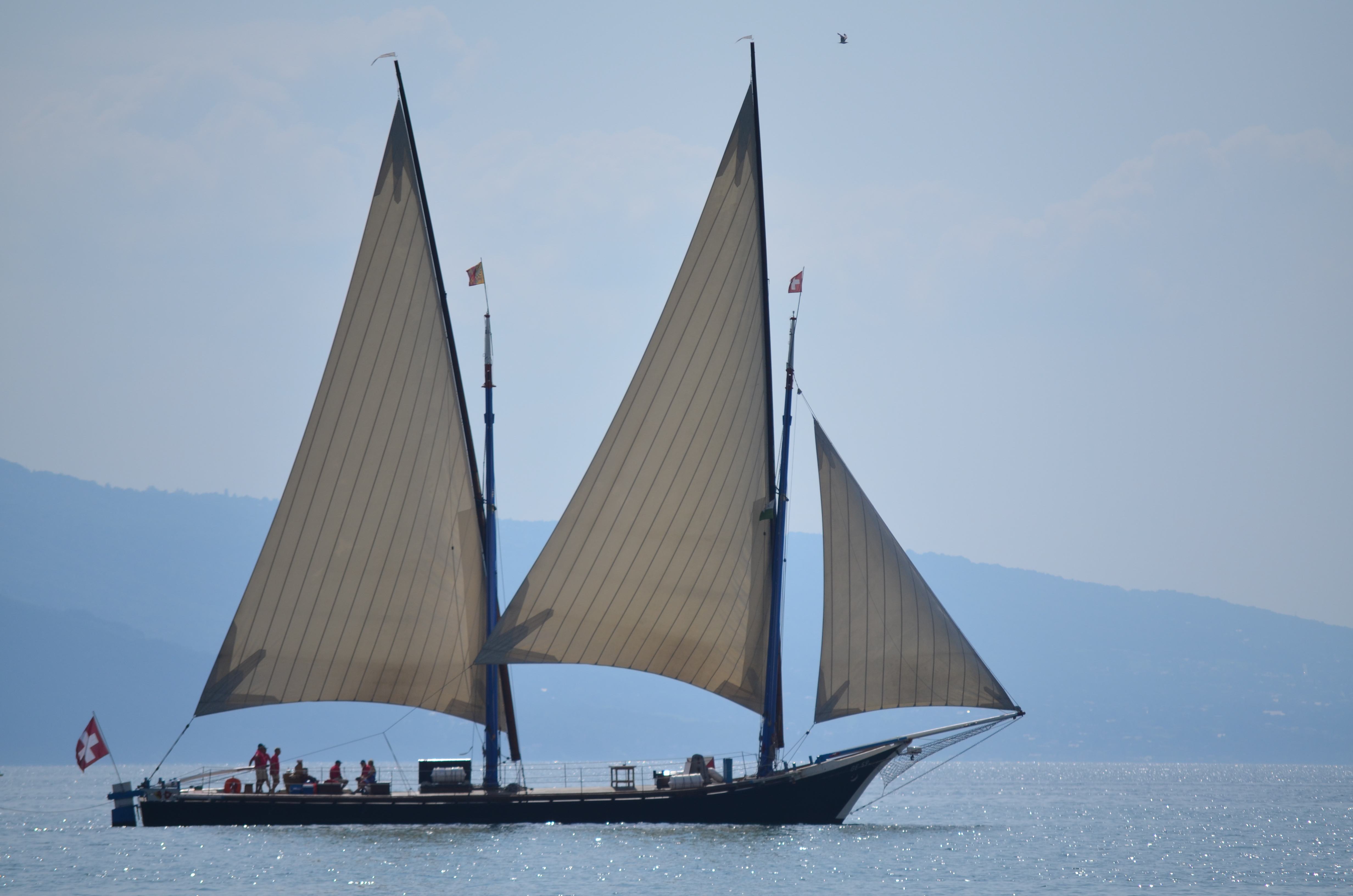 La Neptune - Vevey - 31 juillet 2014 - 04